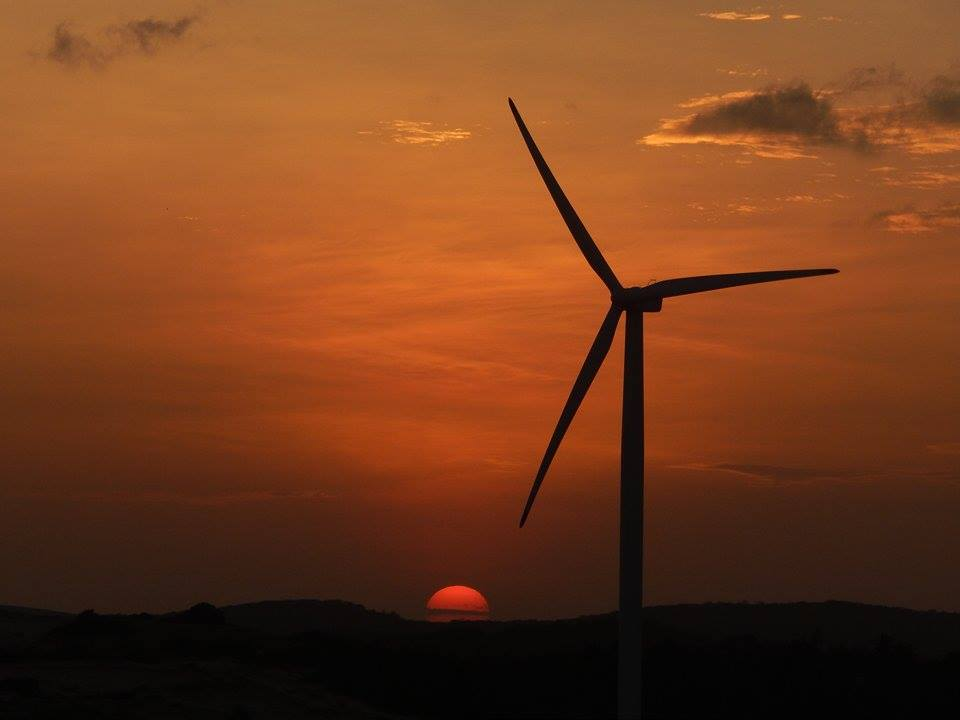 Foto de autoria minha, Tirada no fim da tarde da Praia da Taiba, no Ceará.